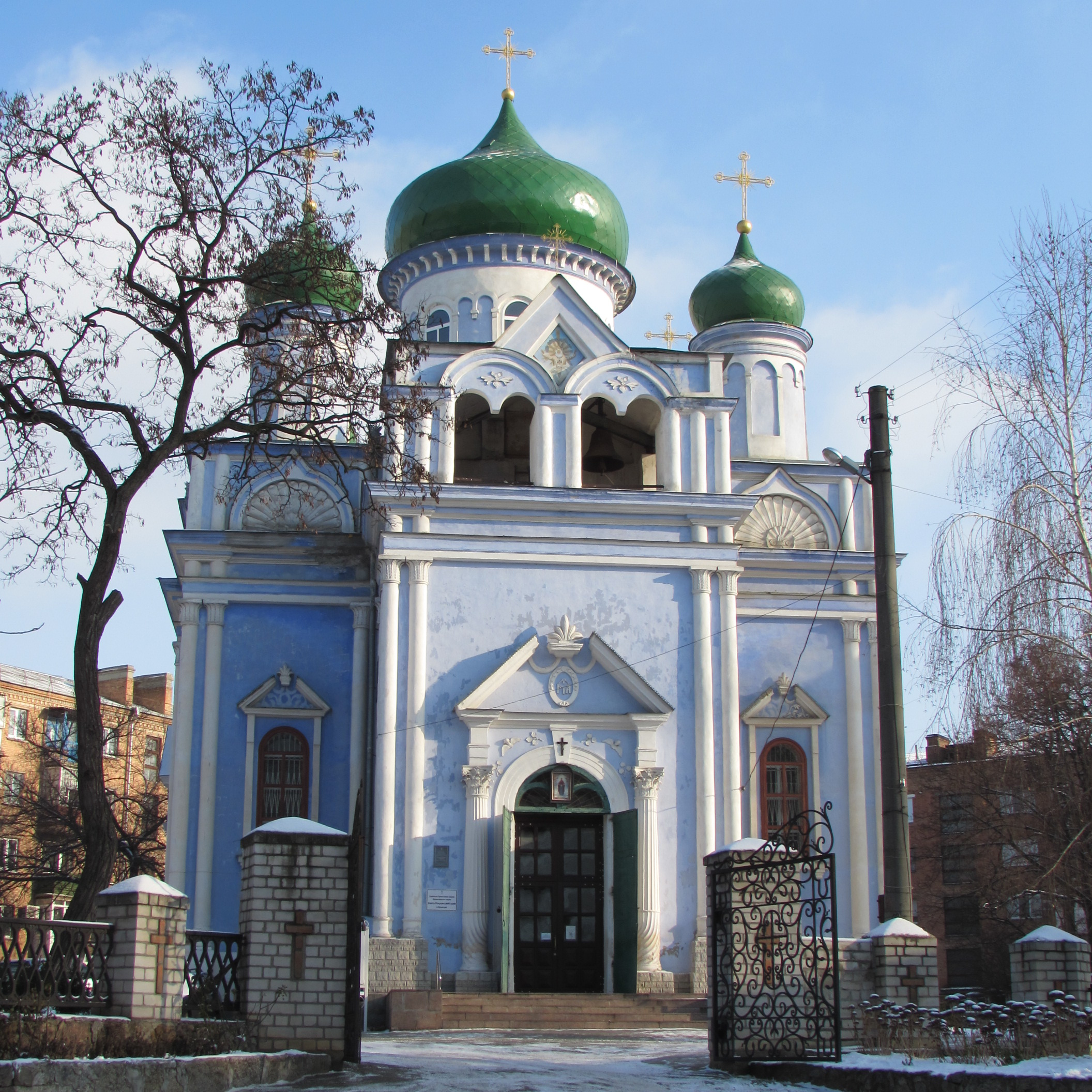 Церква в ім'я Покрова Пресвятої Богородиці, Кропивницький, вул. Ю. Олефіренка (Фрунзе), 14